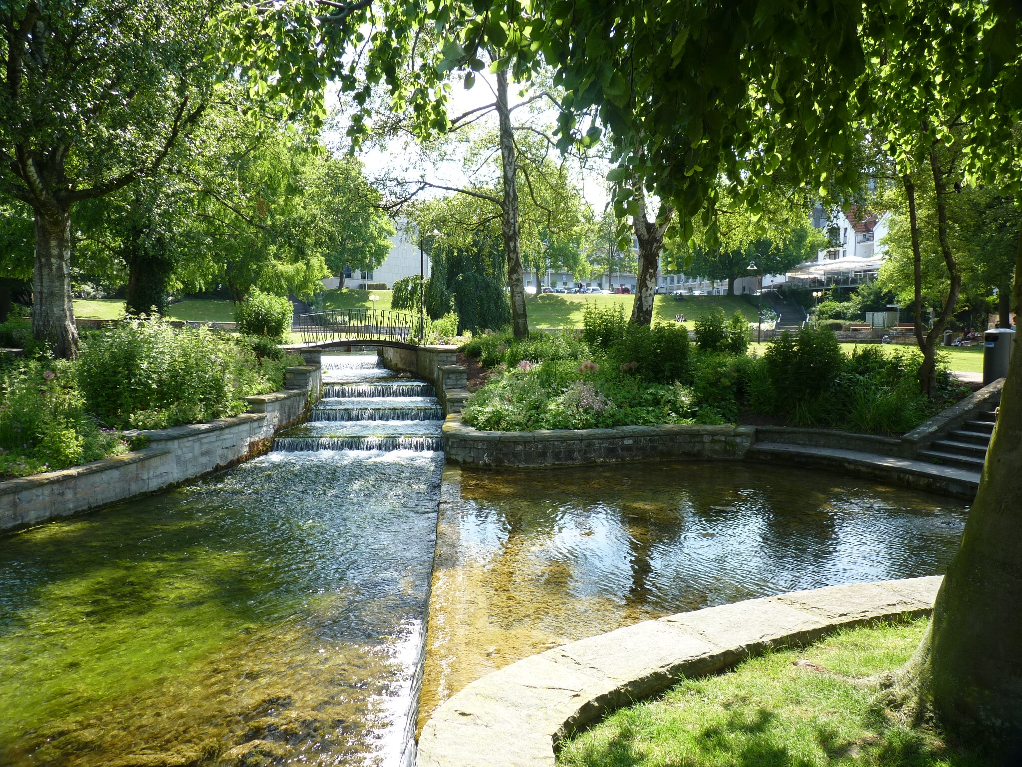 Pader im Westlichen Paderquellgebiet; im Vordergrund: Quellbecken der Dammpader